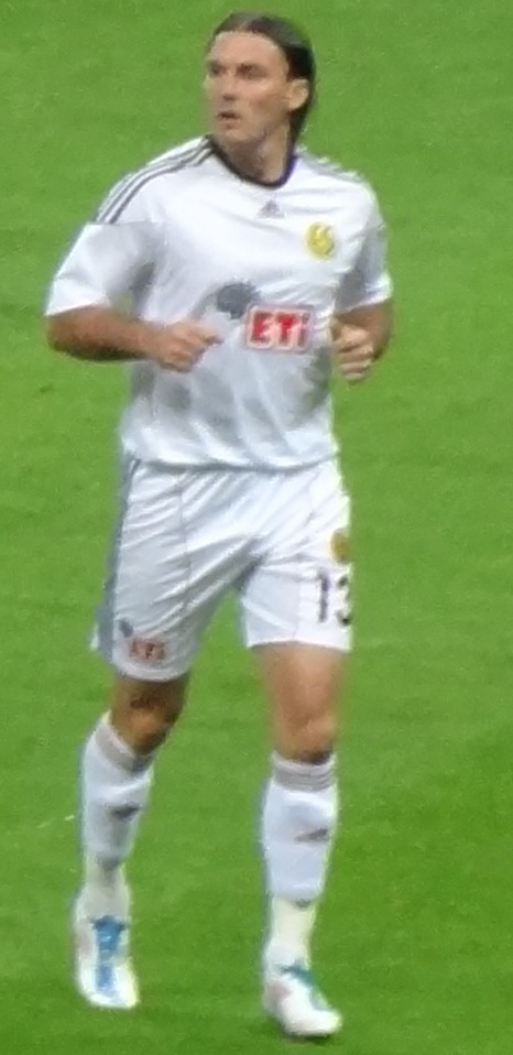 Nadarevic Galatasaray karşısında